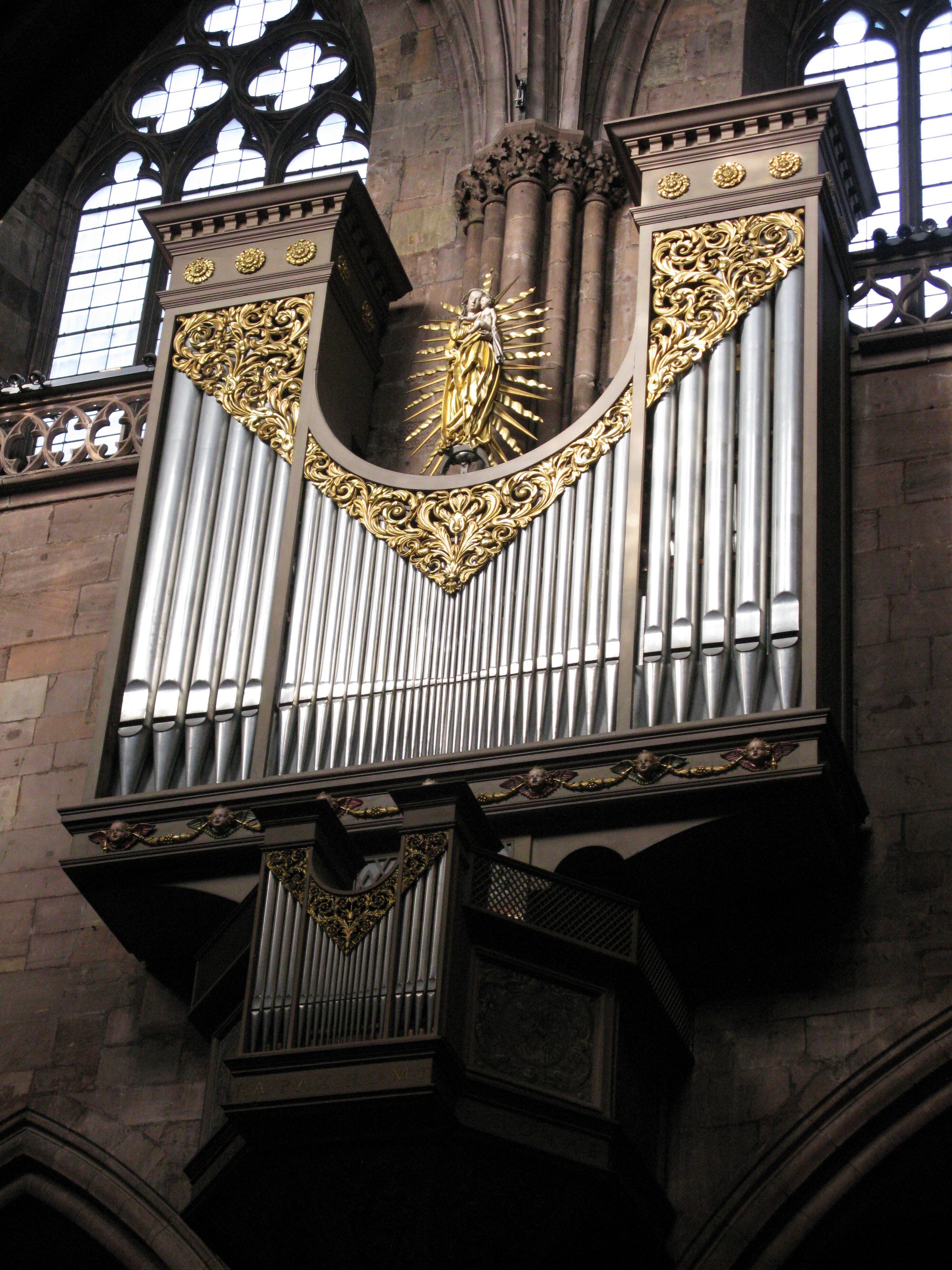 Freiburger Münster, Schwalbennestorgel mit Marienstatue von Hans Sixt von Staufen (1545, ohne Strahlenmandorla)